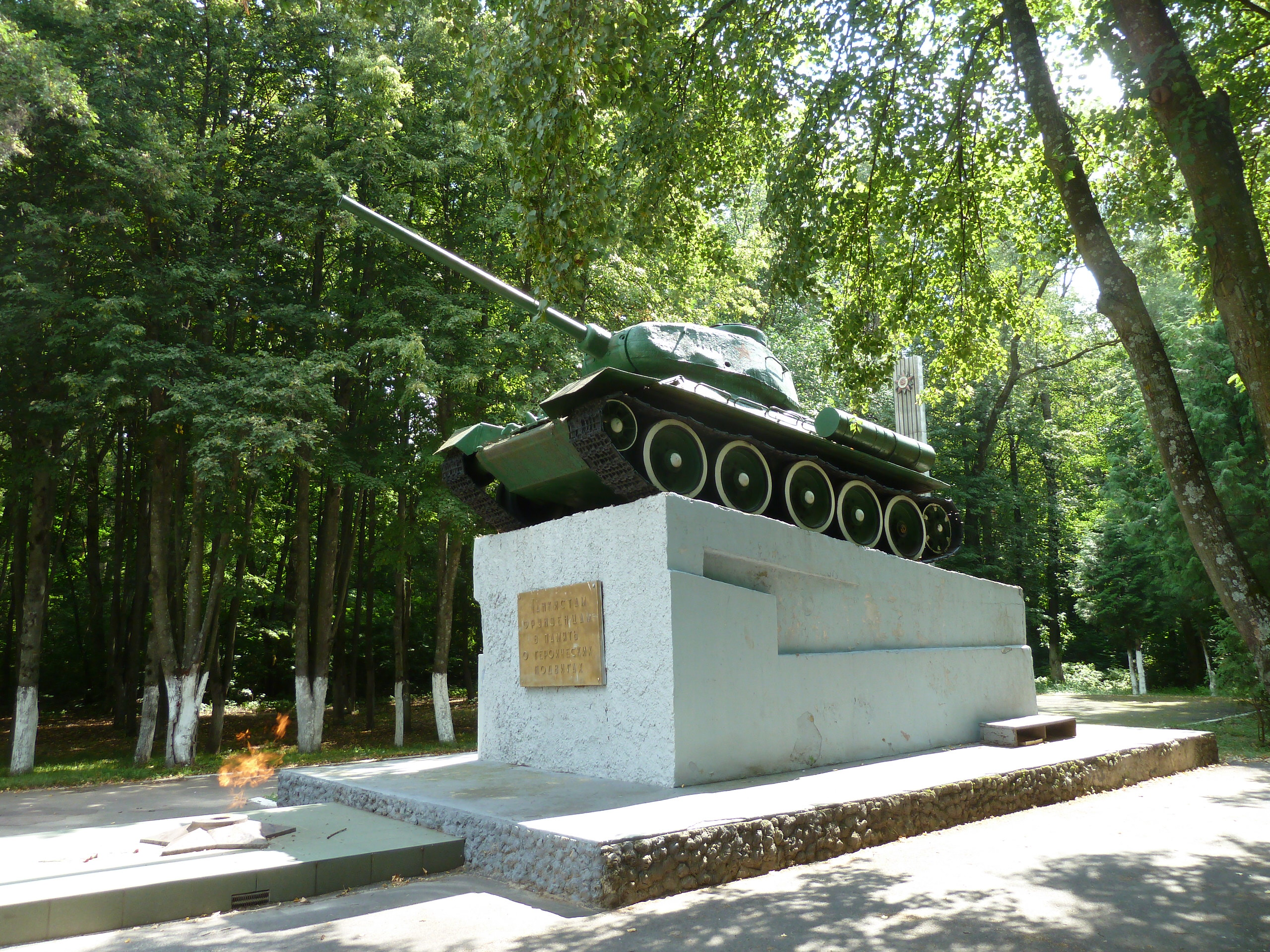 Мемориальный комплекс в лесопарке «Цон» на месте летних лагерей Орловского танкового училища имени М. В. Фрунзе